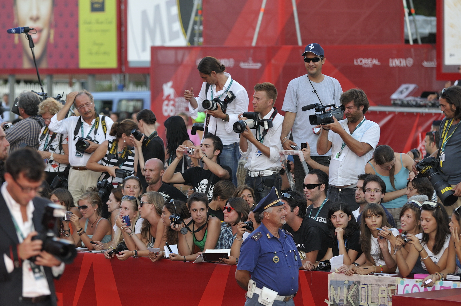 66ème Festival du Cinéma de Venise (Mostra), 3ème jour (04/09/2009) Tapis Rouge avec Nicolas Cage, Eva Mendes et le réalisateur Werner Herzog pour le film : Bad Lieutenant : Port of Call New Orleans